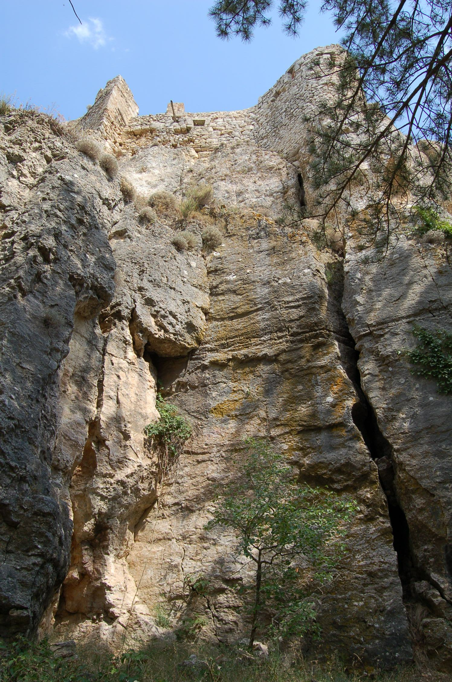 Lugar por donde se conquistó Morella.26 enero 1838